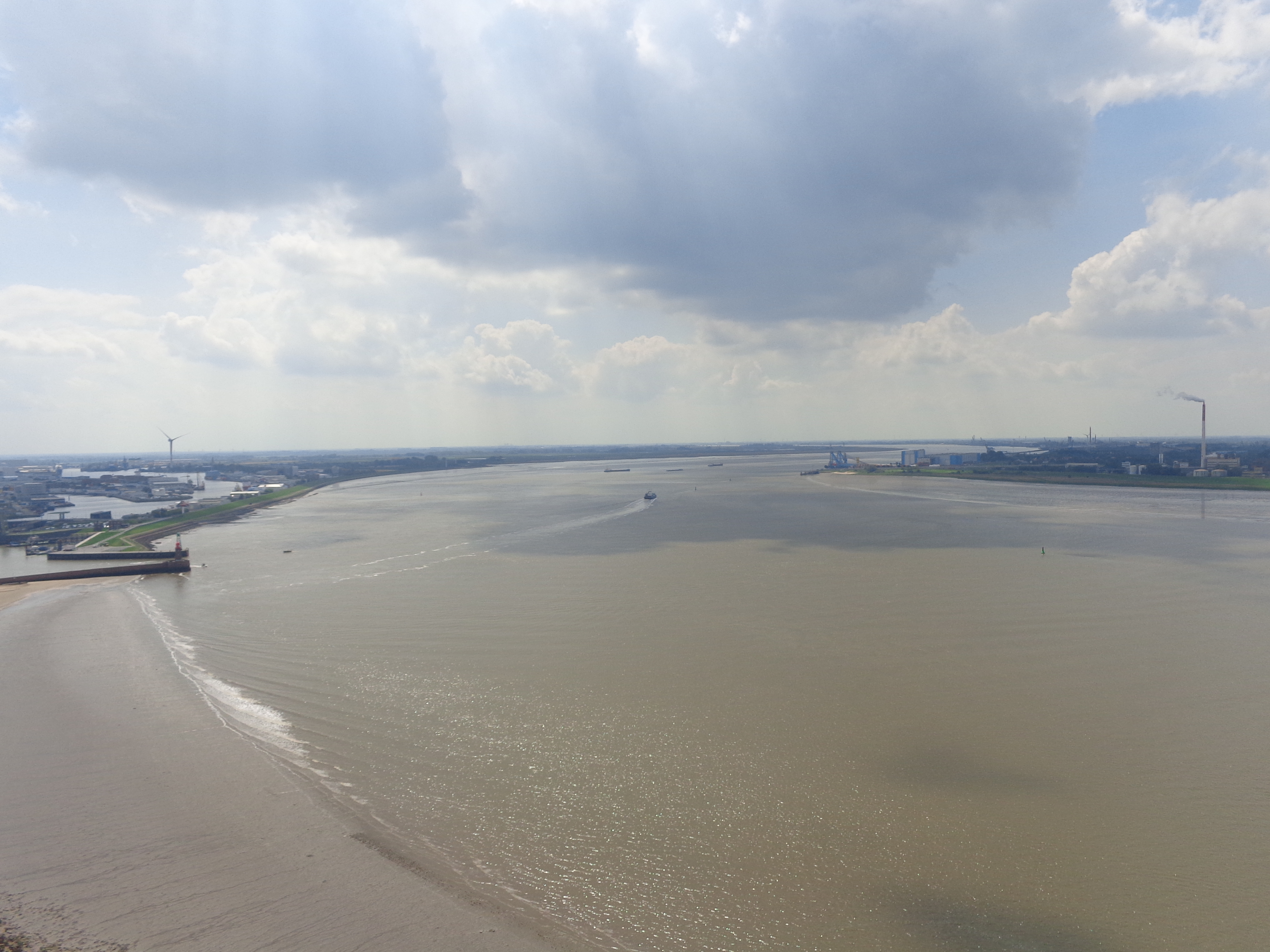 Weserbogen vor Bremerhaven, links Weserbad, Geestemündung und Blexen-Reede. Blick nach Süden vom Atlantic Hotel Sail City.